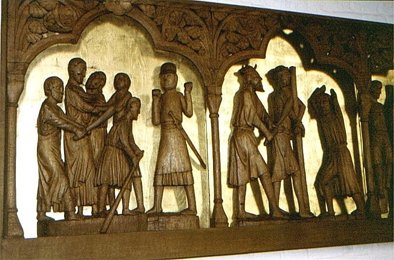 Hürup Kirke i Sydslesvig. Tilfangetagelsen og Piskningen